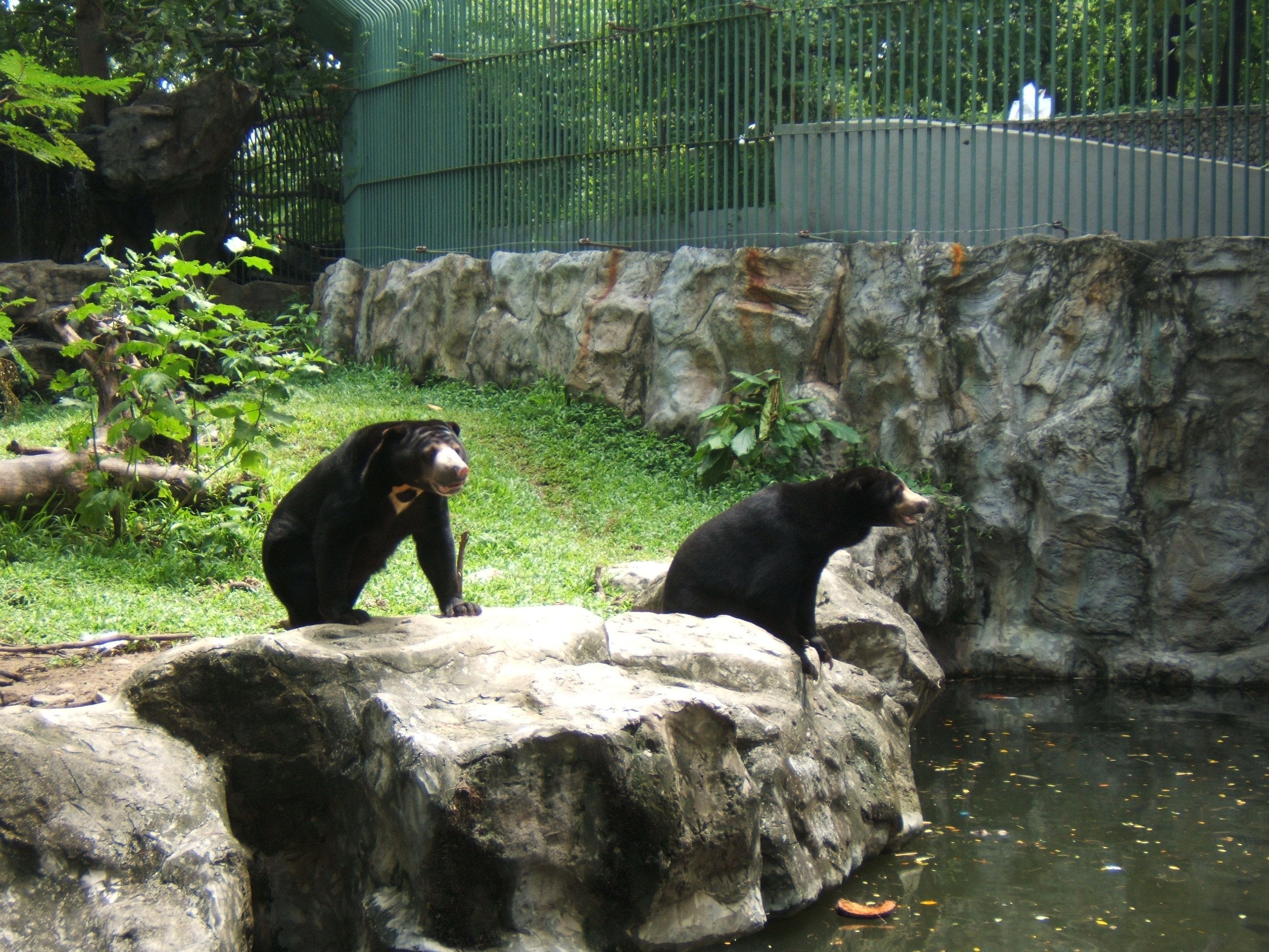 Bärenanlage im Dusit-Zoo, Bangkok